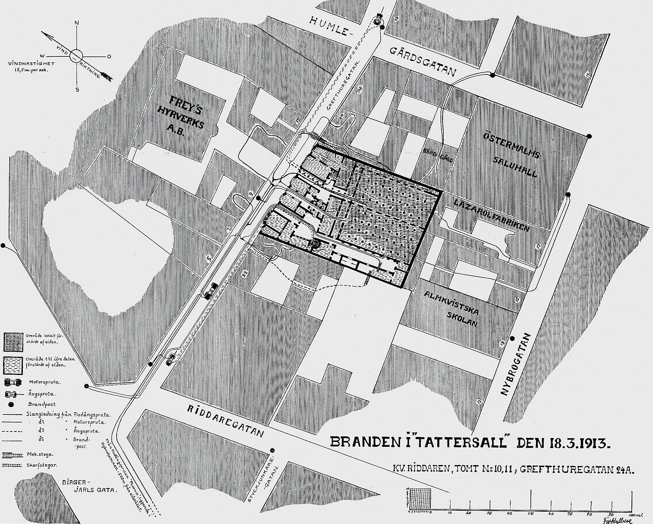 Ritning över branden på Tattersall